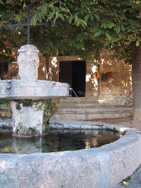 Entrada al Caserón del Santuario de Misericrodia (Borja)